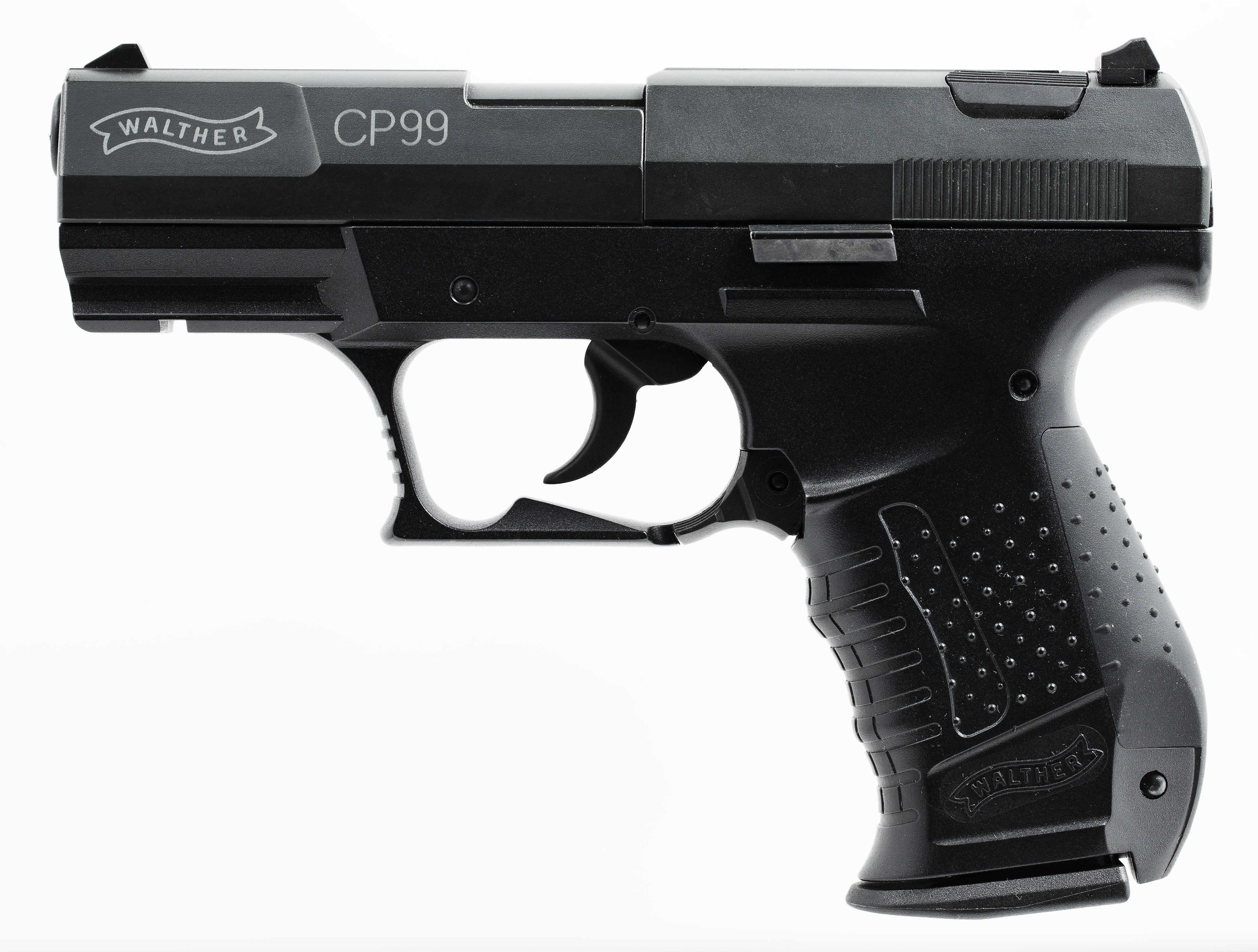 Walther CP99 CO₂-Sportpistole für 4,5-mm-Diabolos mit Gaskartuschen